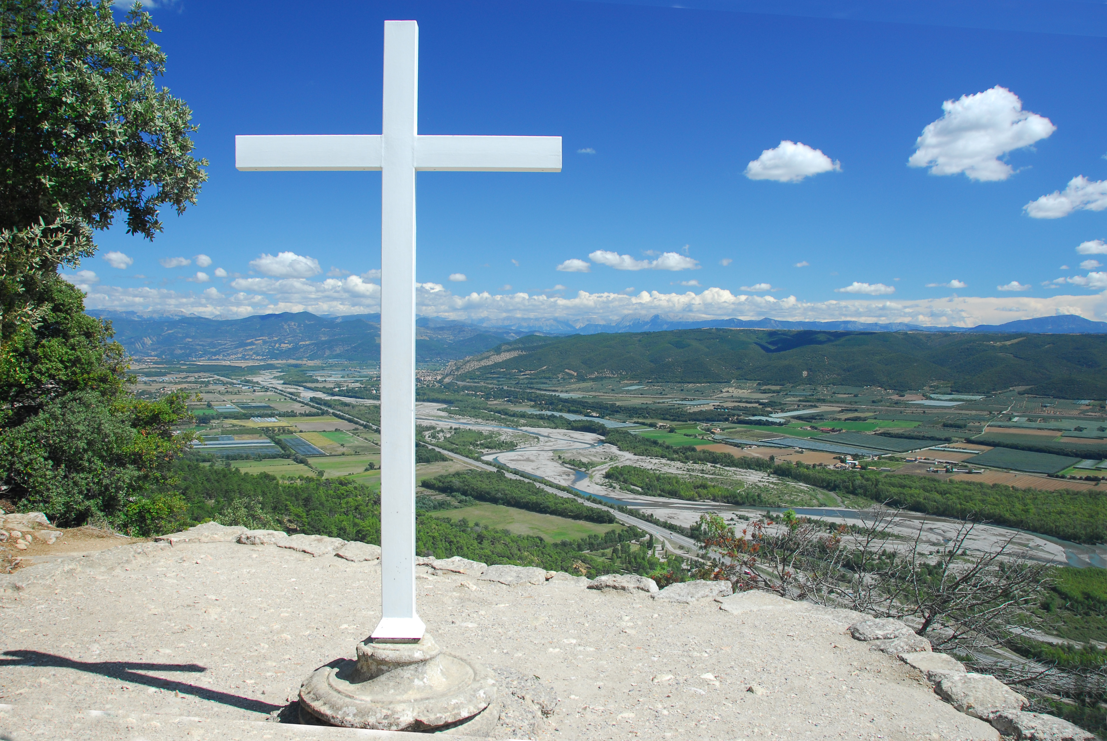 Prieuré de Ganagobie, Aussicht über das Tal der Durance nach N